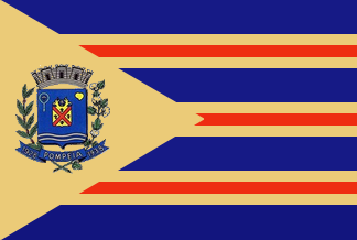 Bandeira de Pompeia - SP - Brasil.